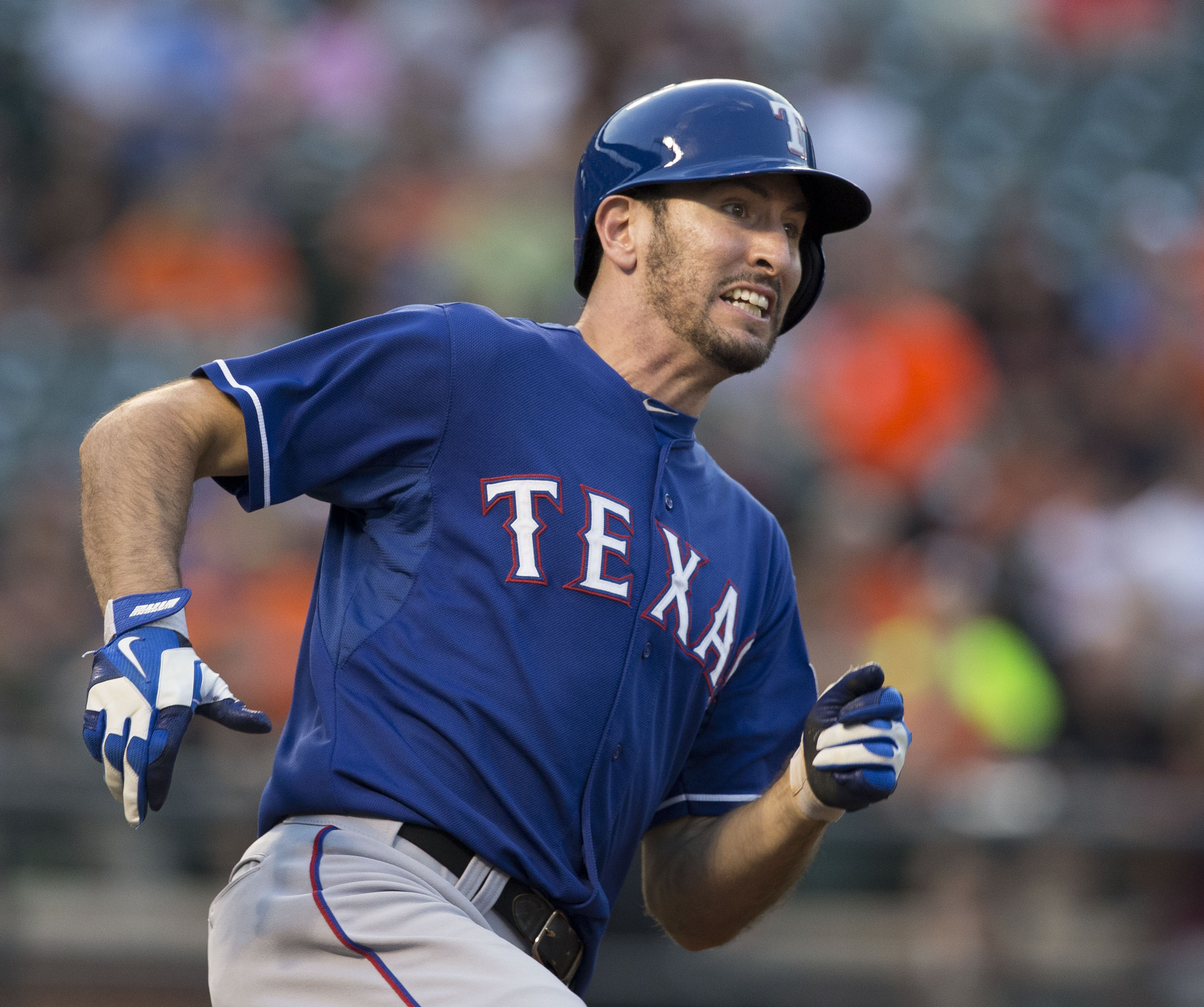 Adam Rosales